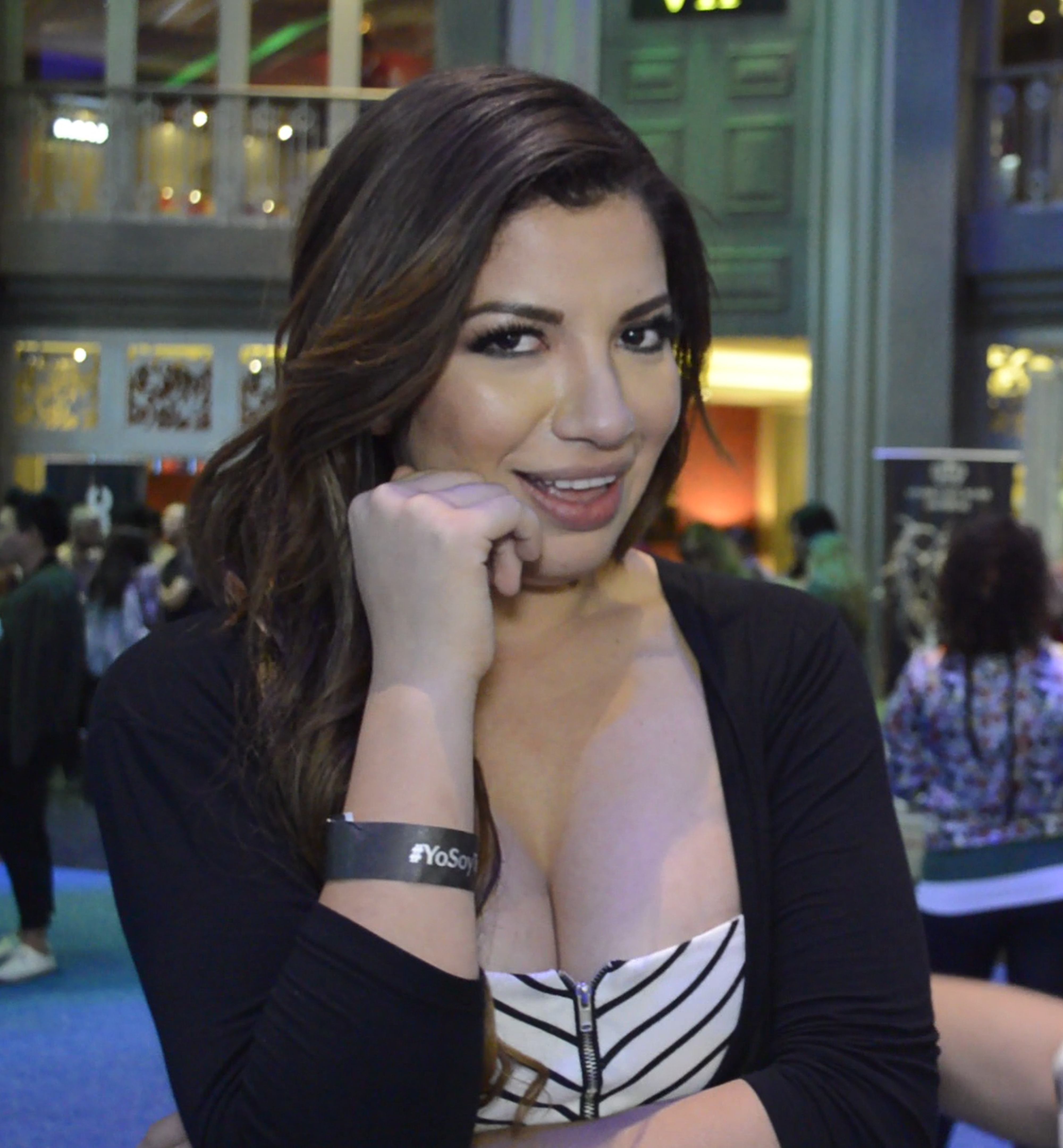 Samantha Grey en 2016 durante la premier de la película Translúcido de Roberto Manrique.